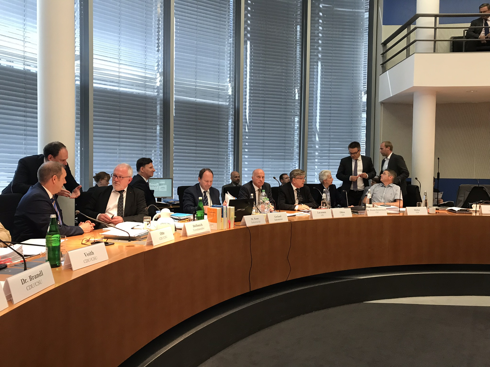 Die MdB`s vorm Ausschussbeginn im Sitzungssaal im Paul-Löbe-Haus